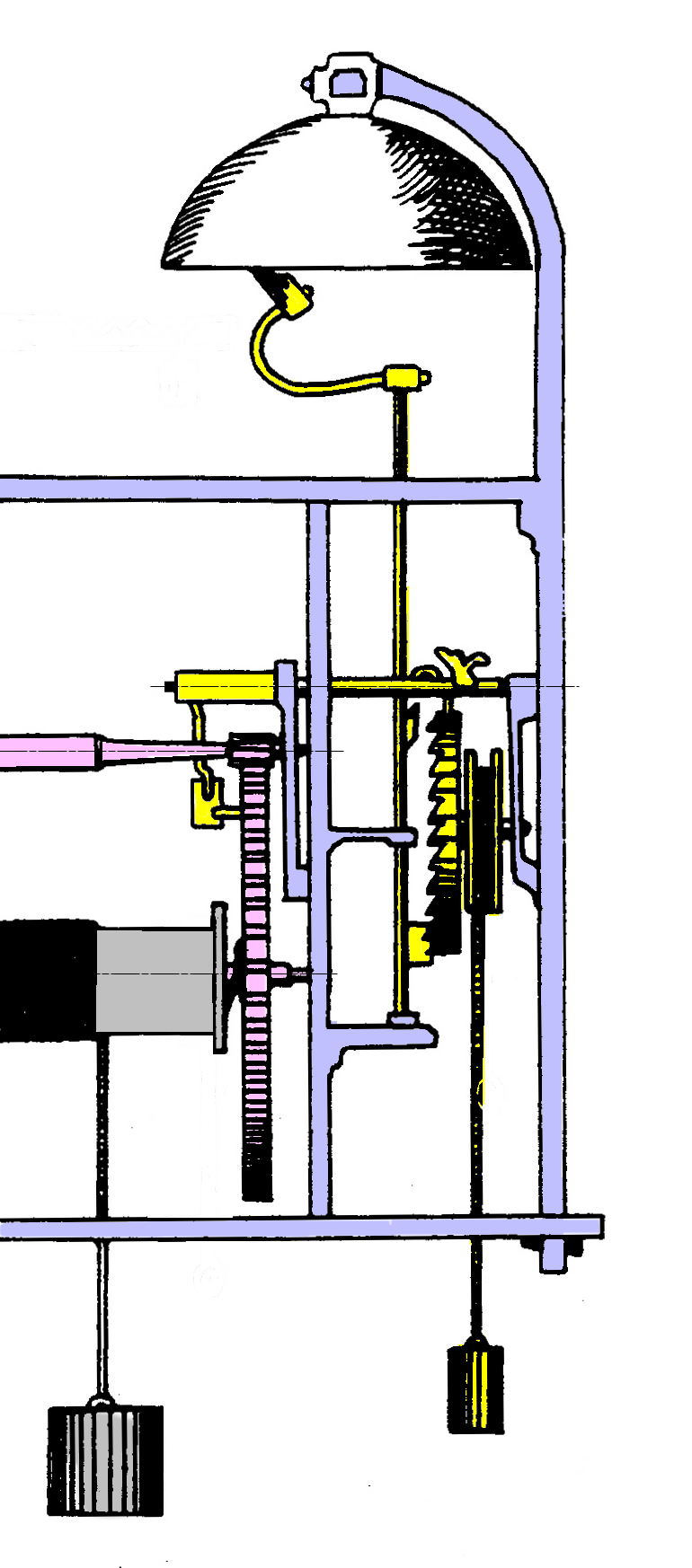 Horloge : mécanisme de sonnerie de réveil (jaune)